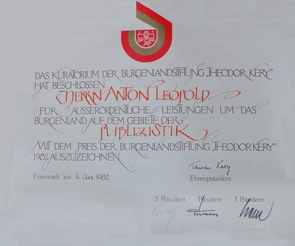 Publizistikpreis der Burgenlandstiftung Theodor Kery - Preis an Anton Leopold, 4 Juni 1982